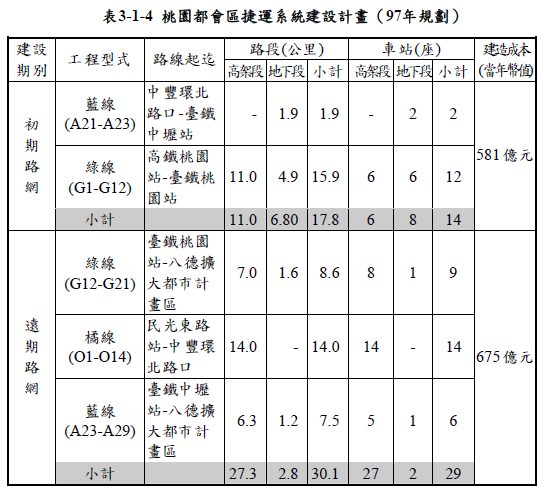 中文（台灣）: 表達林同棪工程顧問公司於2006年所規畫的桃園都會區大眾捷運系統分期的方案